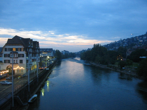 Die Limmat nach dem Zusammenfluss mit der Sihl in Zürich, von der Hardbrücke aus fotografiert